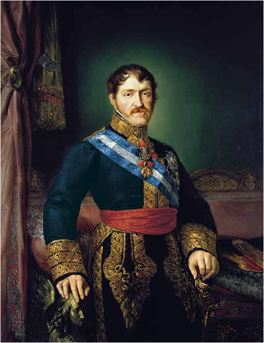 Retrato del infante de España Carlos María Isidro de Borbón (1788-1855), que fue hijo del rey Carlos IV de España y hermano de Fernando VII. Y a la muerte de este ultimo, disputó el trono de España a su sobrina, Isabel II, en el enfrentamiento conocido como la Primera Guerra Carlista, que finalizó en 1839 con el Abrazo de Vergara.